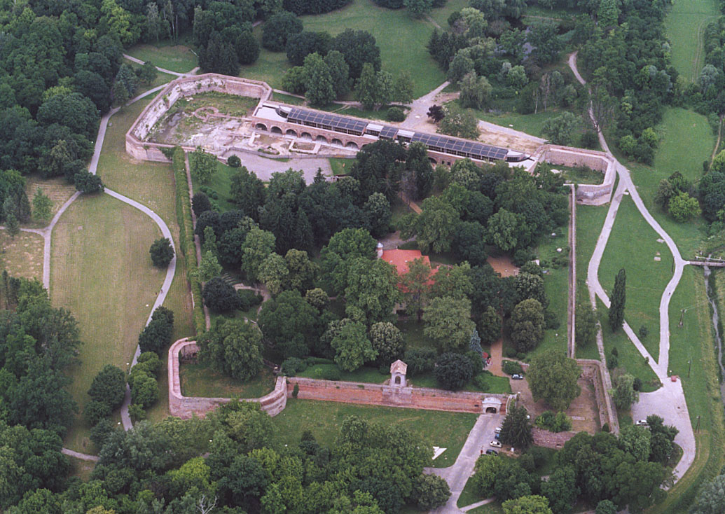 Castle - Szigetvár - Hungary - Europe